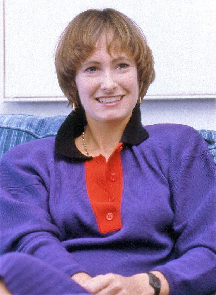 Gale Anne Hurd in Sweden promoting "Aliens"